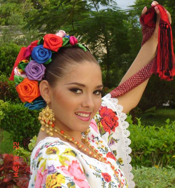 Lizzie Jimenez Castillo